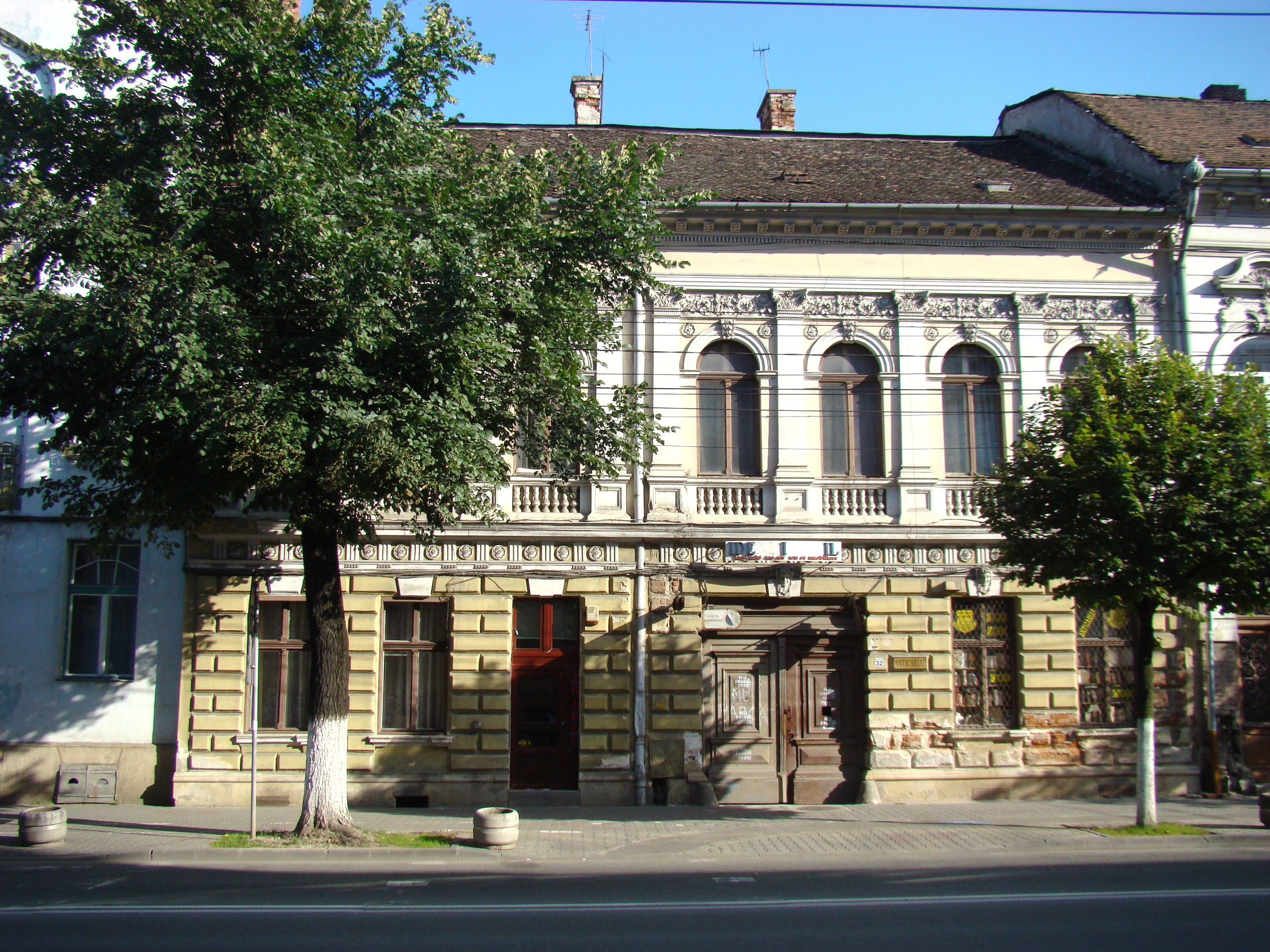 Casă, monument istoric, Bd.21 Decembrie 1989, nr.32